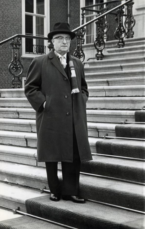 De heer C.N. van Dis (SGP) op de trappen van Paleis Huis Ten Bosch voor overleg over de Kabinetsformatie. Nederland, Den Haag, 18 mei 1963.